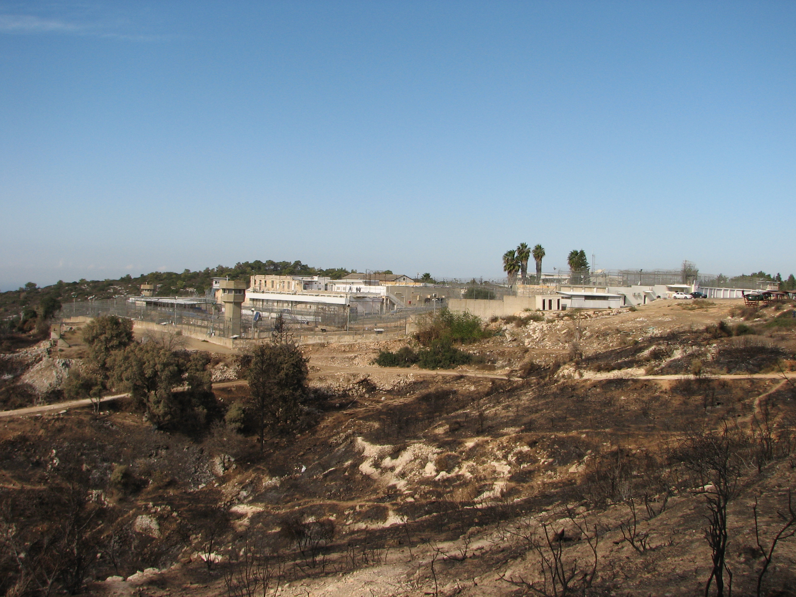 Damon Prison, located on Mount Caramel. Israel בית סוהר דמון הוא בית כלא השוכן על הר הכרמל. בית הסוהר הוקם בשנת 1953 האזור ליד בית הסוהר , שמורת הר אלון, נשרף בשריפת הכרמל בחודש דצמבר 2010